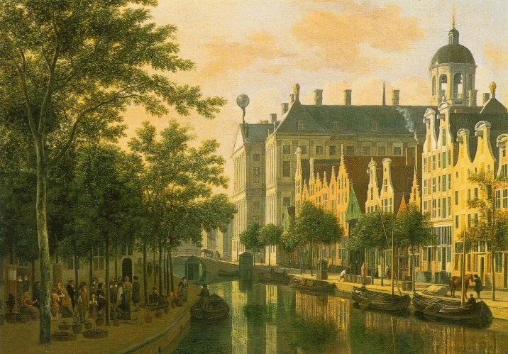 Gerrit Adriaensz. Berckheyde. De Nieuwezijds Voorburgwal in Amsterdam. 1686. Olieverf op doek. 53,7 × 63,9 cm. Madrid, Museo Thyssen-Bornemisza, Madrid. or Backside former townhall in the Hermitage, Saint Petersburg.